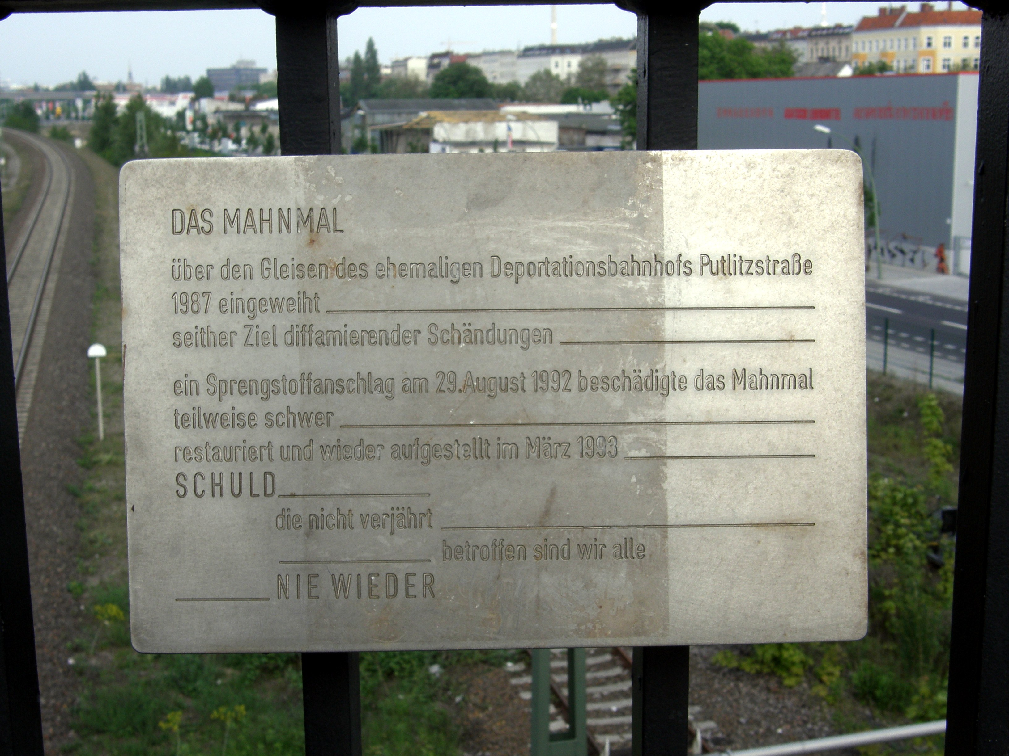 Informationstafel zum deportationsmahnmal Putlitzbrücke